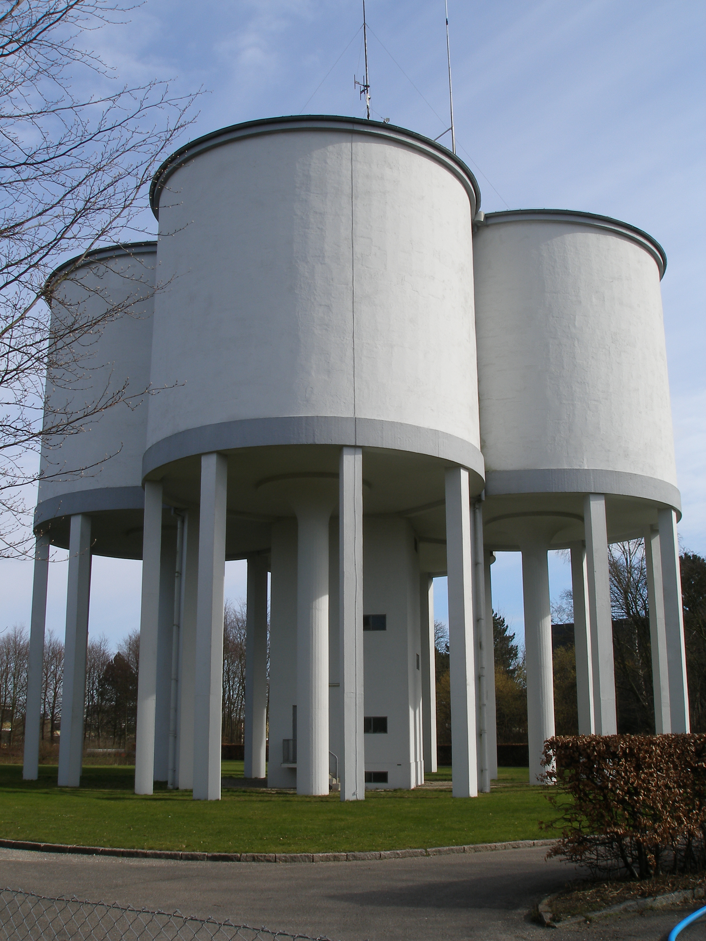 Det "hvide" vandtårn på Danmarks Tekniske Universitet (DTU), Lyngby